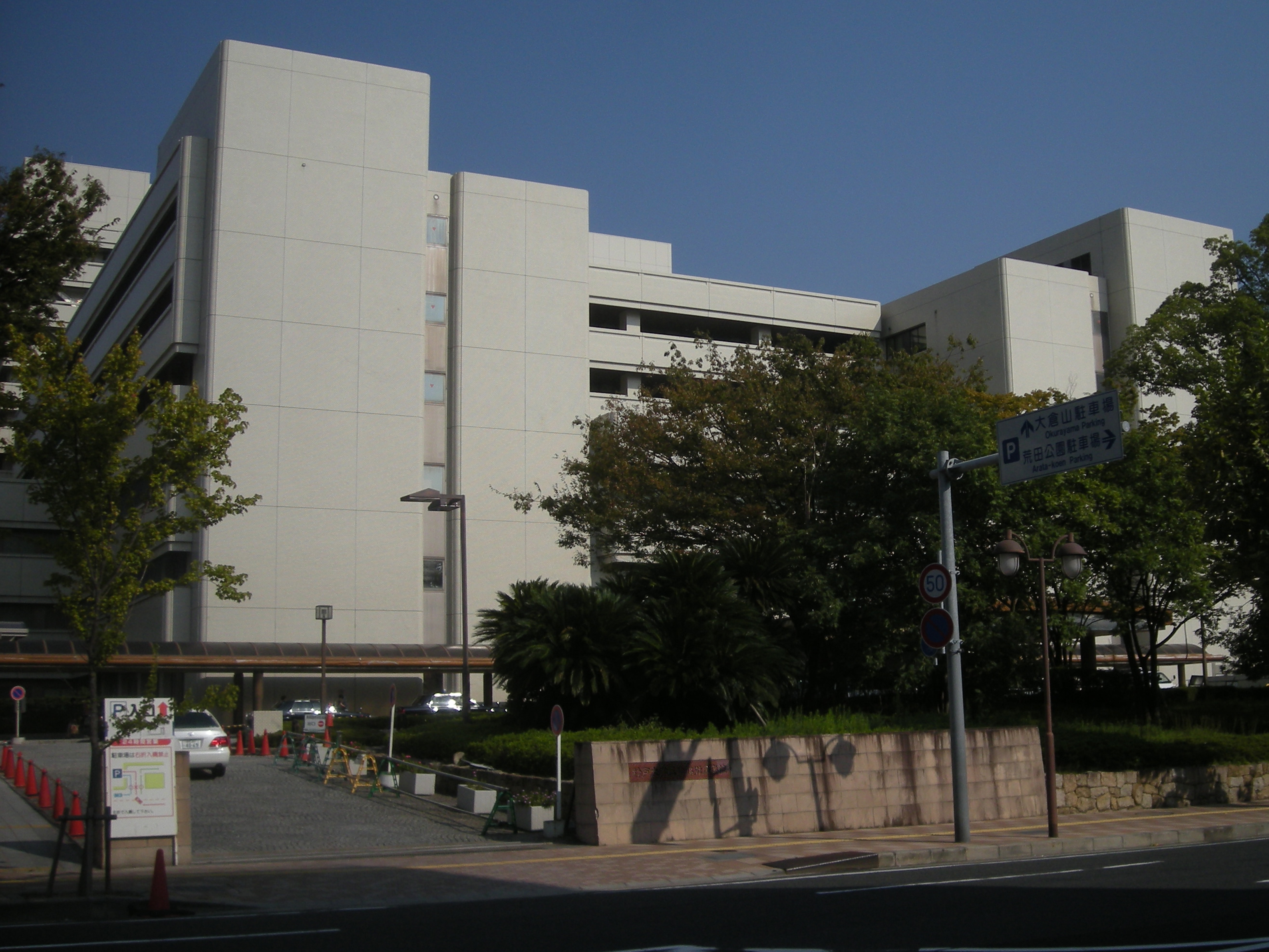 神戸大学医学部附属病院